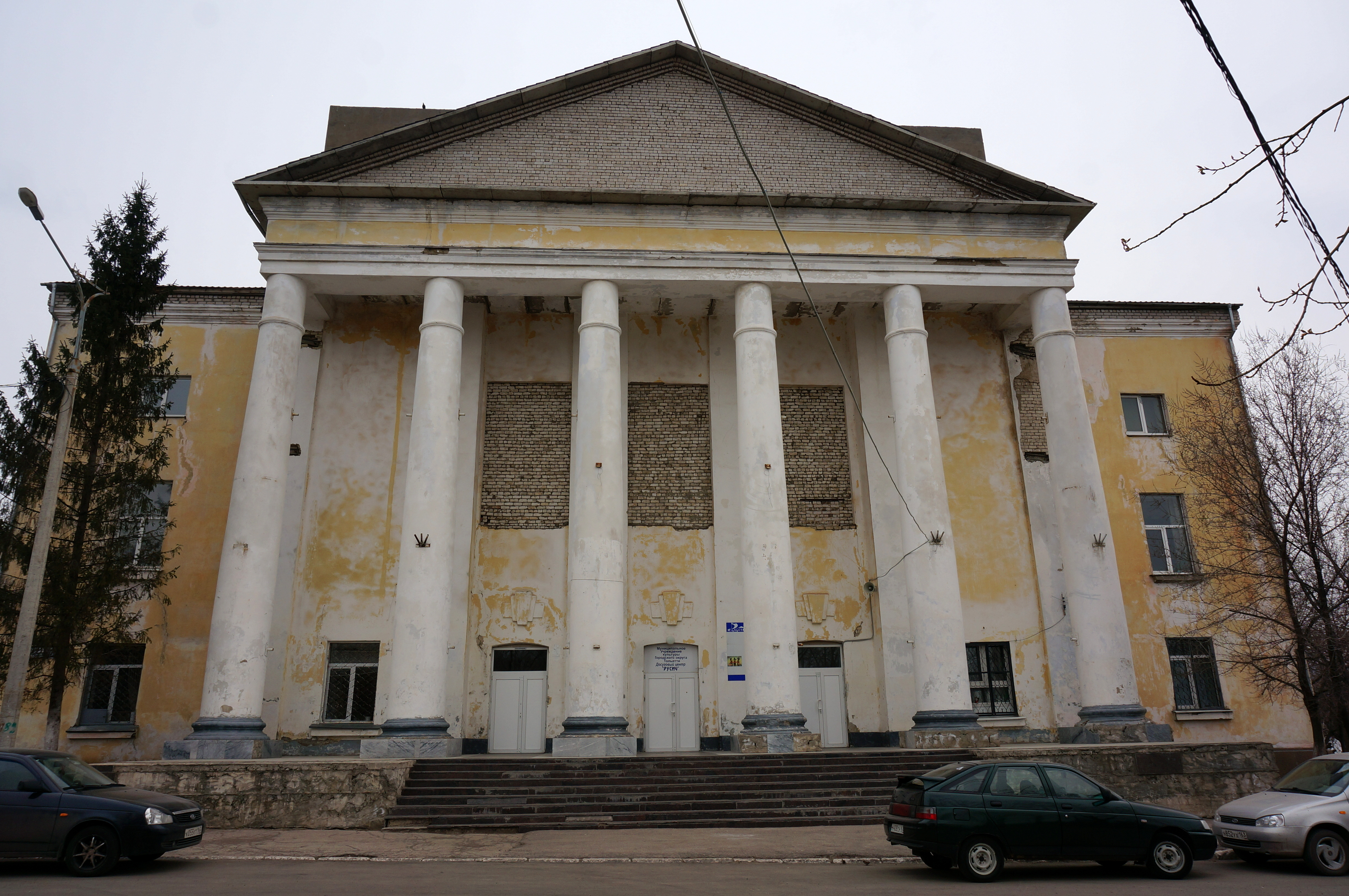 Россия, Тольятти, ул. Носова 10. Здание клуба на 420 мест архитектора И. Е. Рожина из института Ленгипрогор. В проекте предусматривались зрительный зал на 320 мест, фойе-лекционный зал на 280 мест, читальный зал на 180 мест и спортивный зал на 100 мест. Строительство началось в 1963 году, заказчиком являлся судоремзавод, подрядчиком СМУ № 7 КГС. В 1964 году задние было сдано. В 2001 году началась реконструкция здания. Ныне в нём находится досуговый центр «Русич»